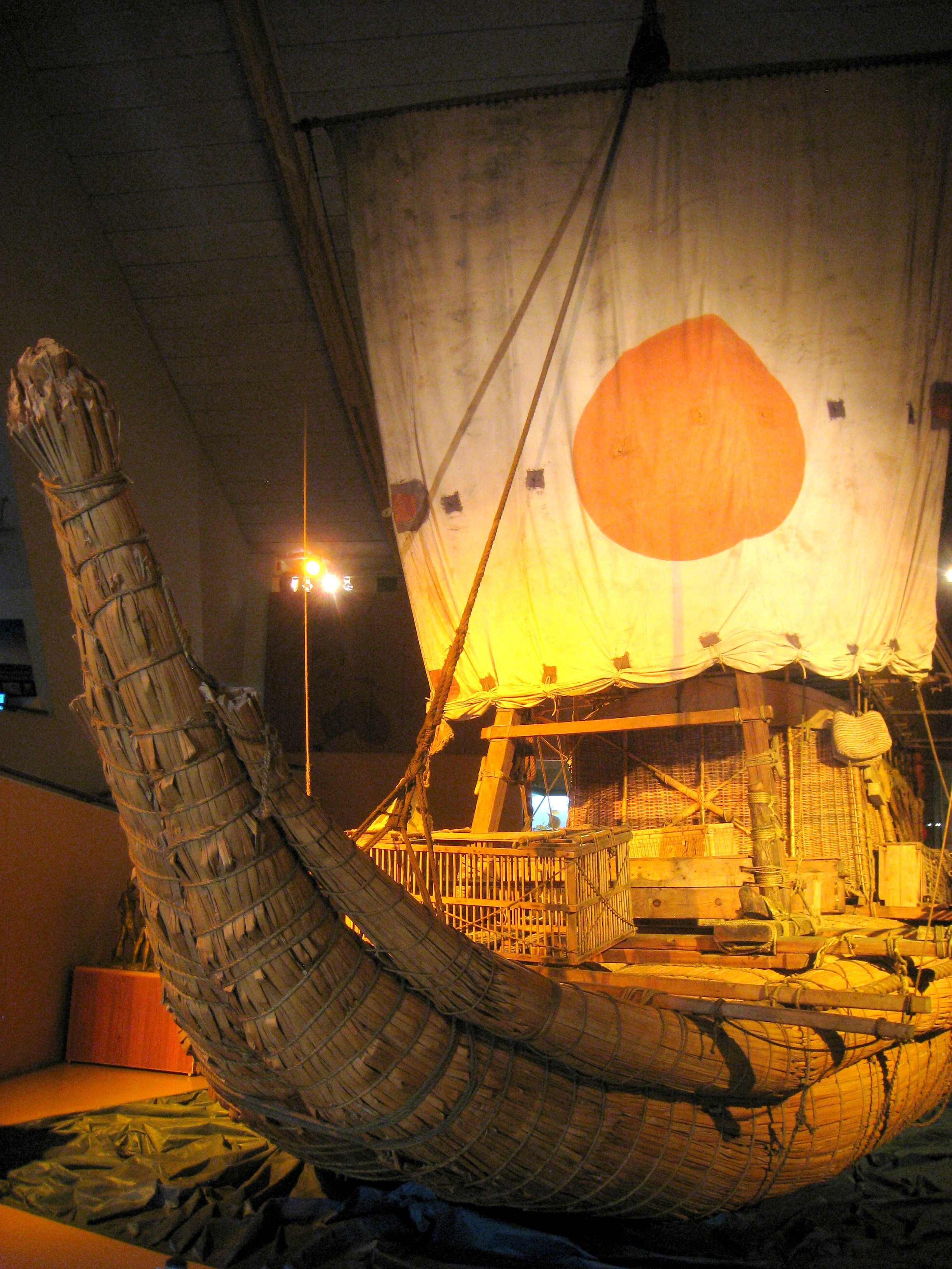 Ra II, in Kon-Tiki Museum, Oslo, Norway.